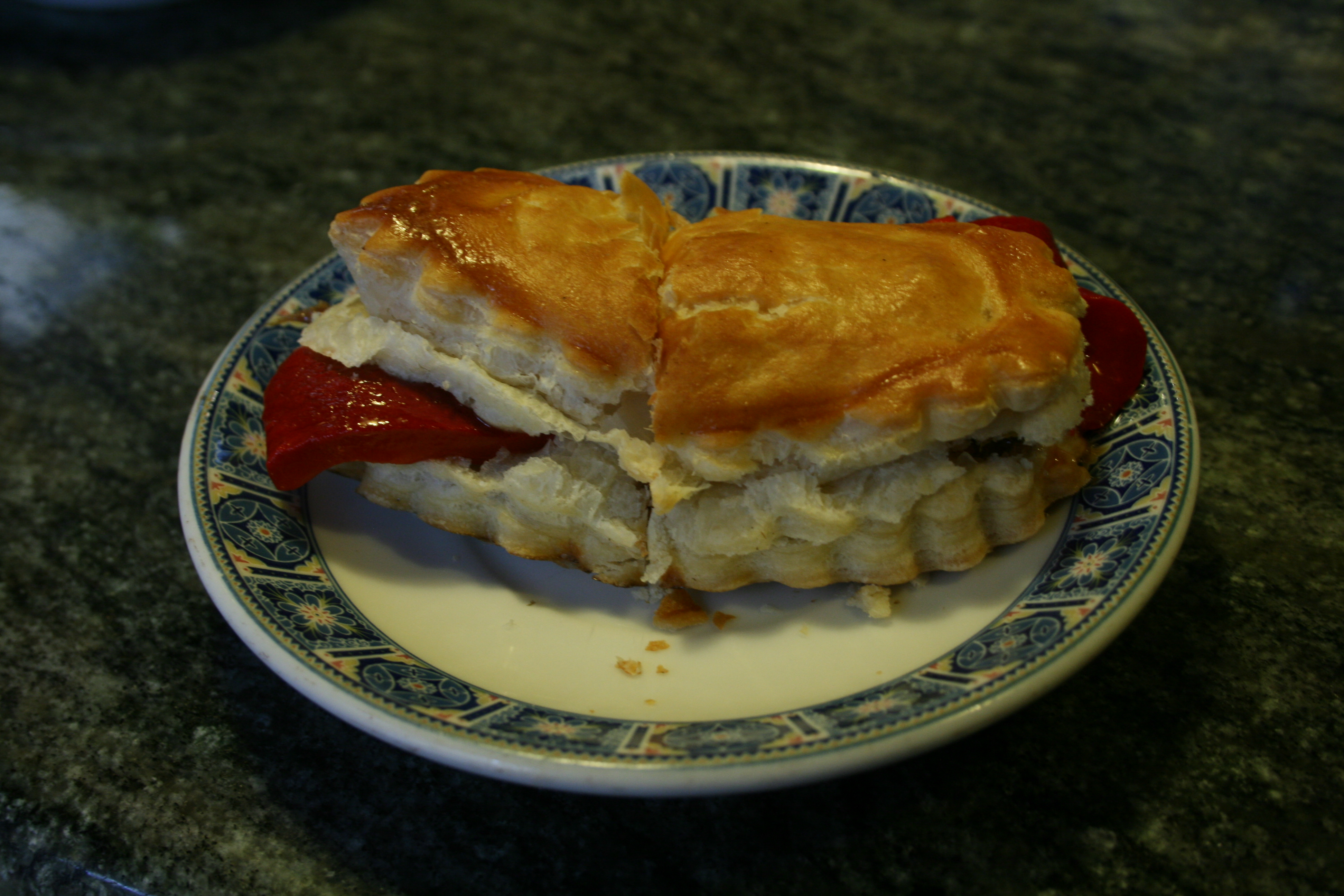 Tapa en Salamanca (Hojaldre con pimiento y anchoa)